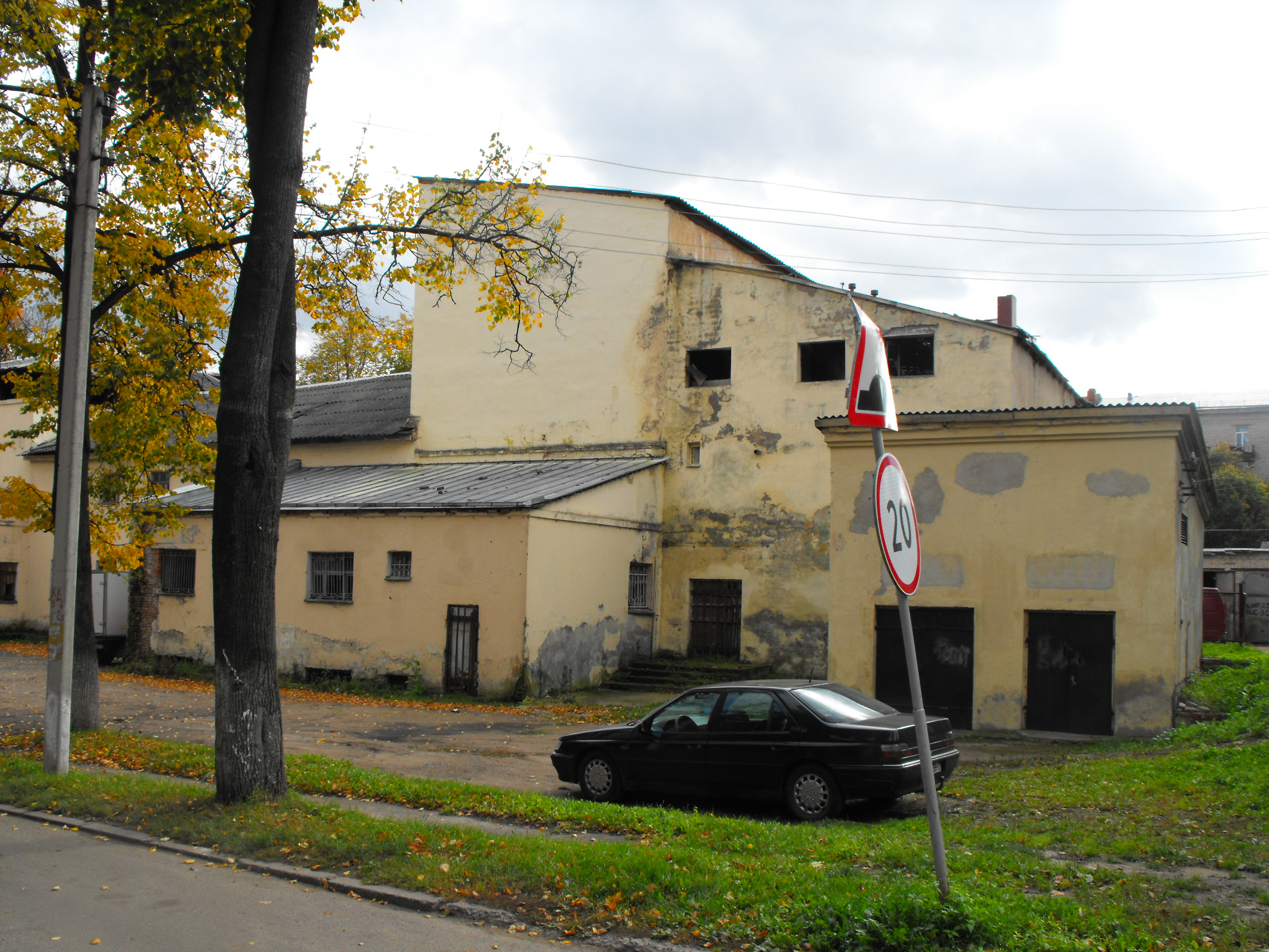 Территория бывшего гетто в Витебске в 1941 году. Занимало район клуба металлистов (здание в центре фотографии) и территорию в пределах нынешних улиц Набережной, Ильинского, Кирова, Комсомольской и Энгельса.